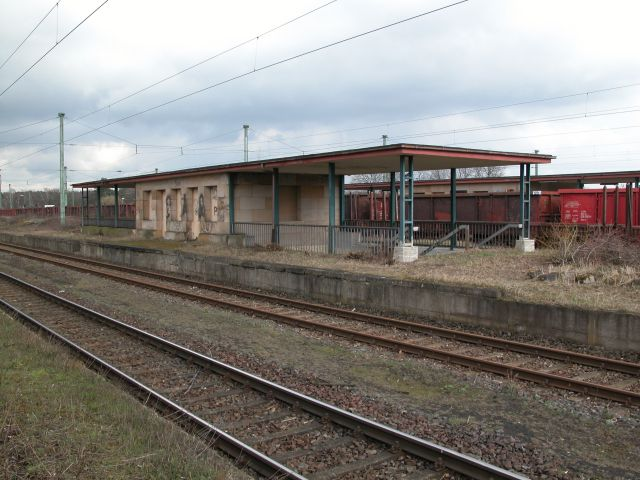 Bahnhof Nürnberg-Langwasser